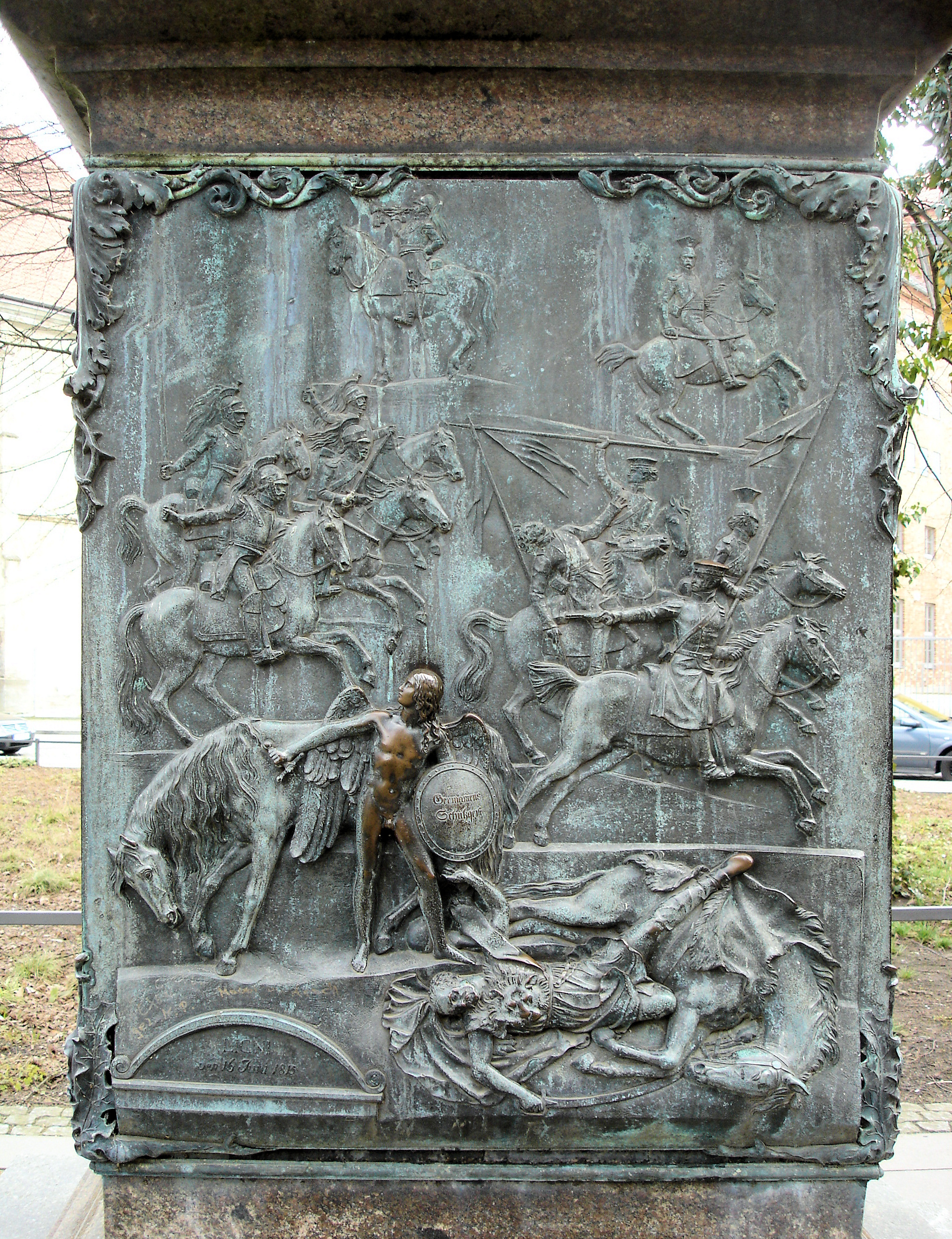 Universitätsplatz Rostock, Blücher-Denkmal Seitenrelief: Blüchers Sturz bei Ligny